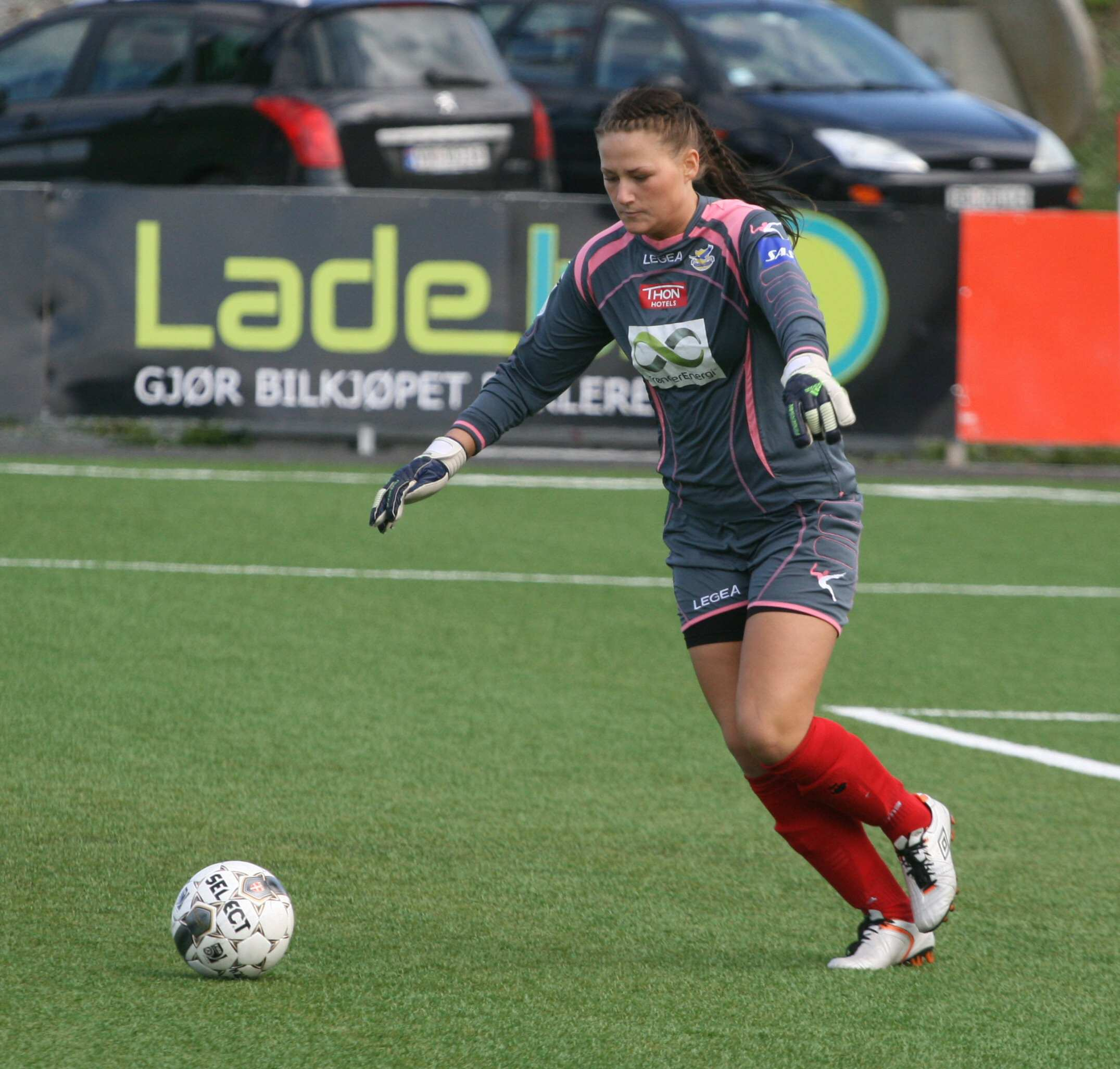 Fotballspilleren Kristine Nøstmo